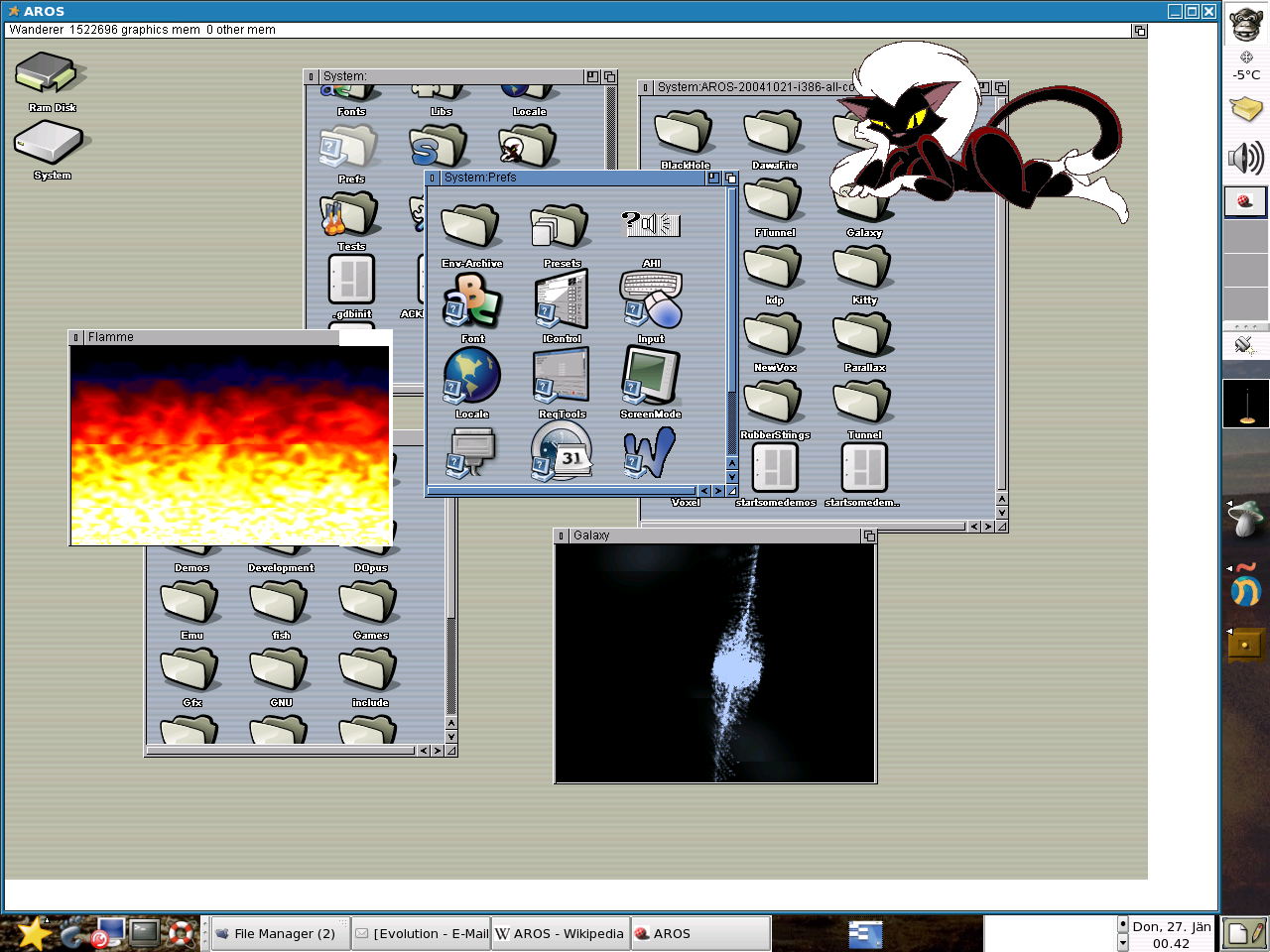 selbst AROS in einem Gnome Fenster